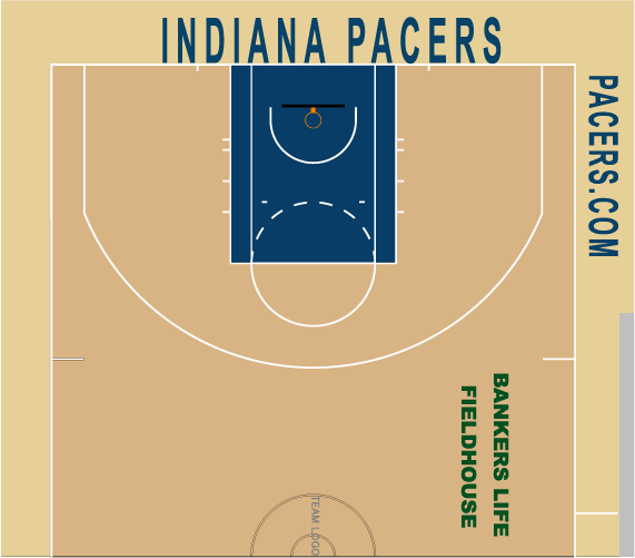 ペイサーズホームコート配色